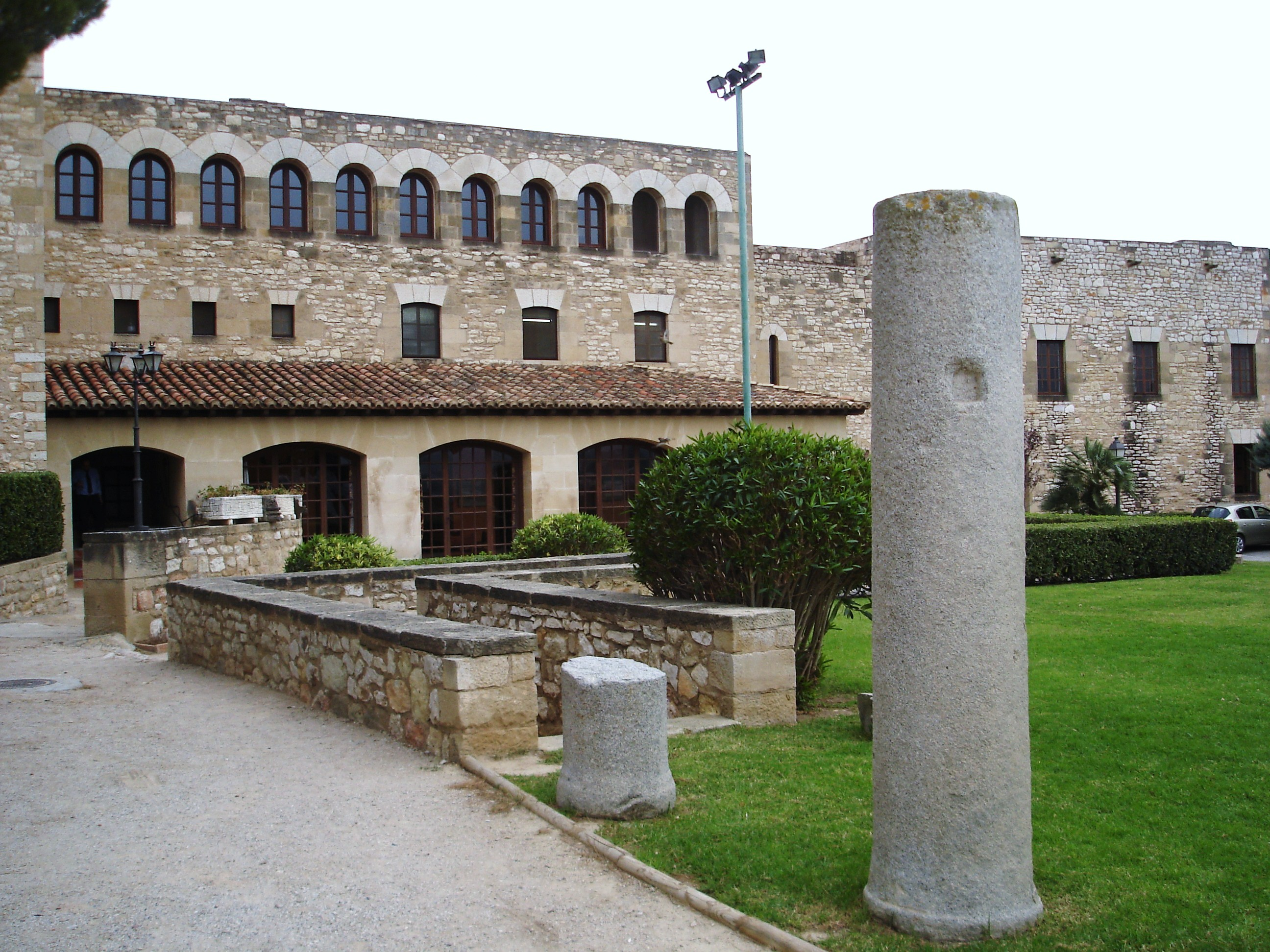 Château de Tortosa (Espagne) intra-muros, transformé en hôtel-restaurant.